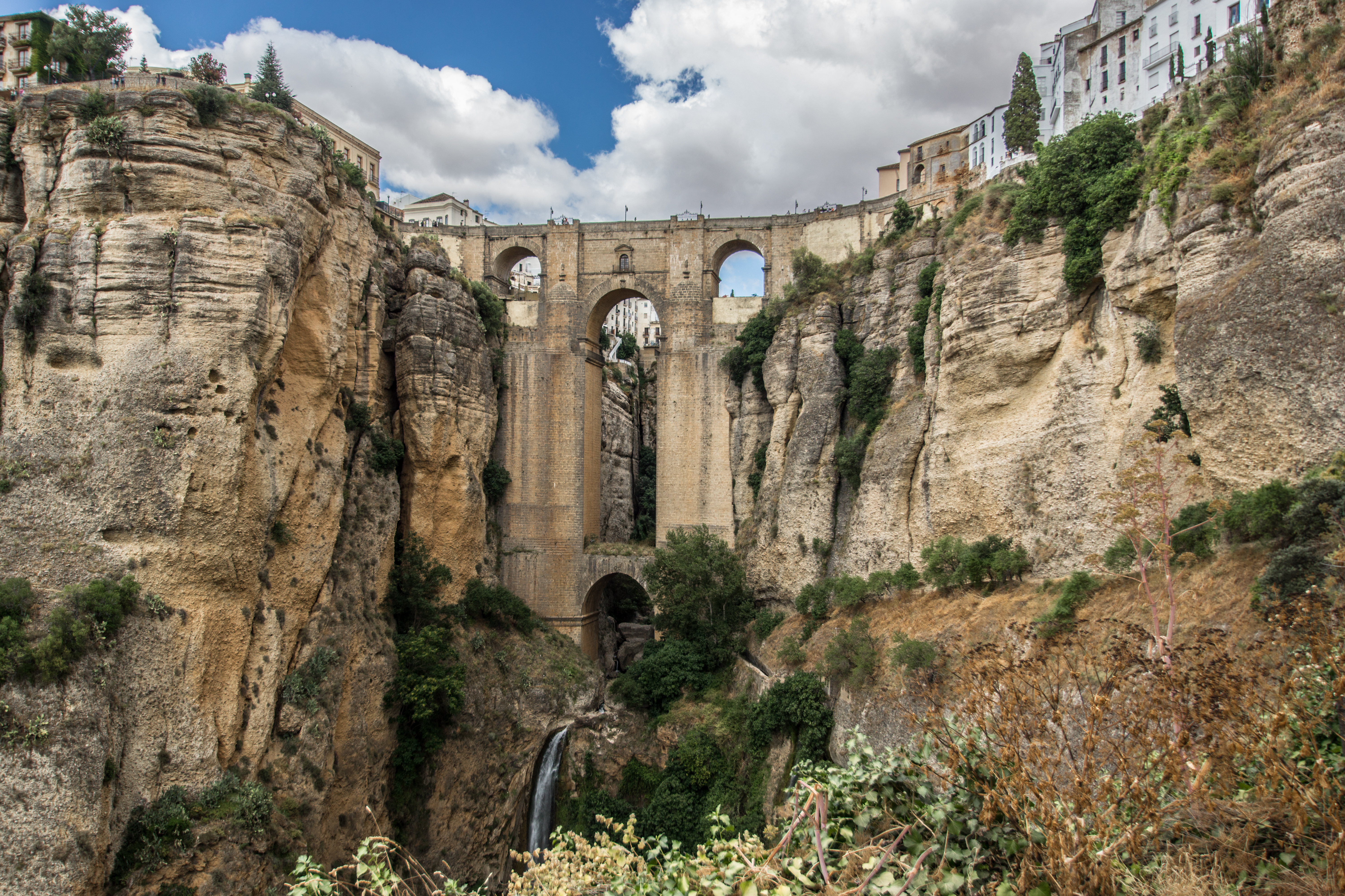 El Tajo de Ronda y el Parador de Turismo